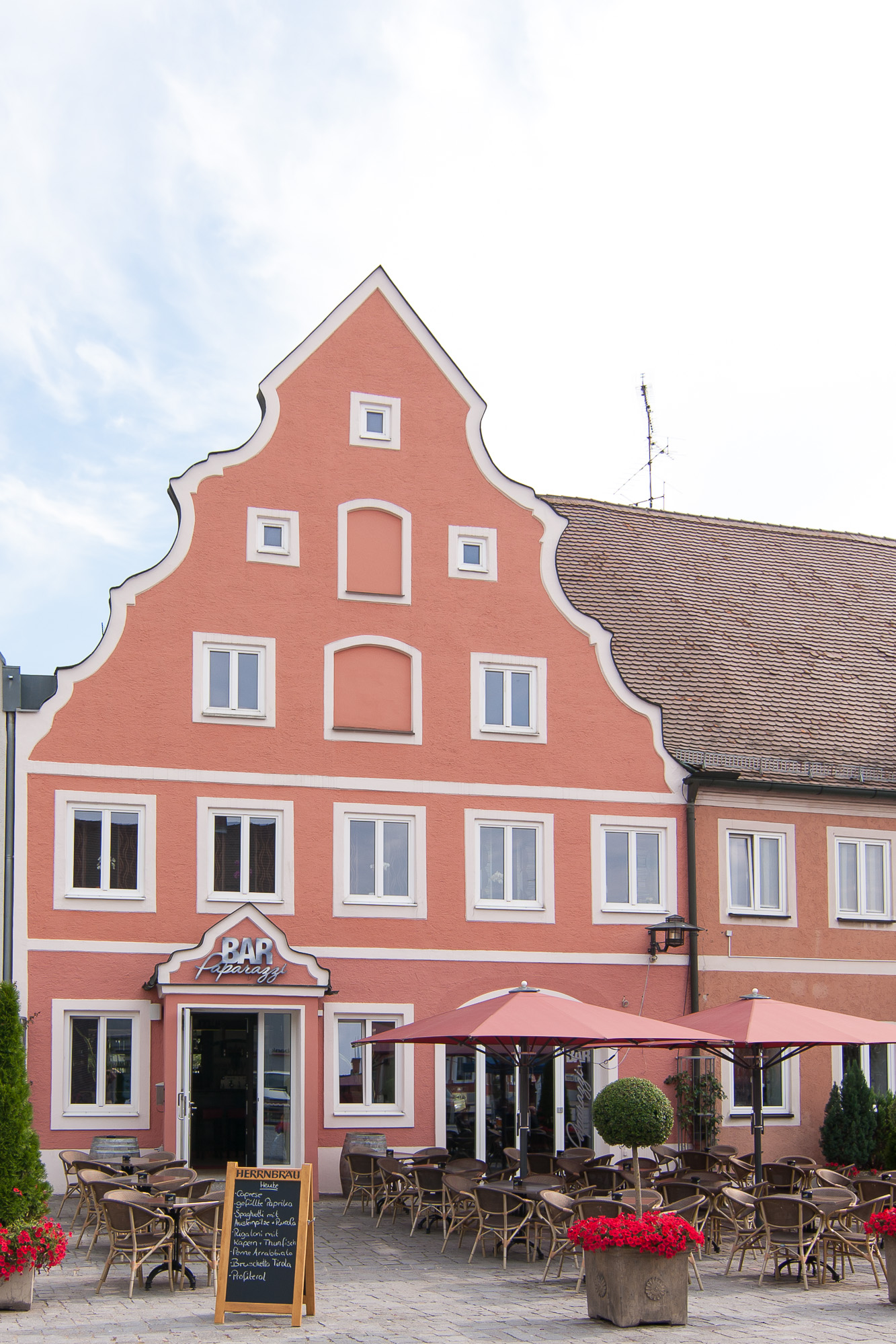 Wohnhaus; mit barockem Schweifgiebel, wohl Anfang 18. Jahrhundert, erneuert.This is a photograph of an architectural monument.